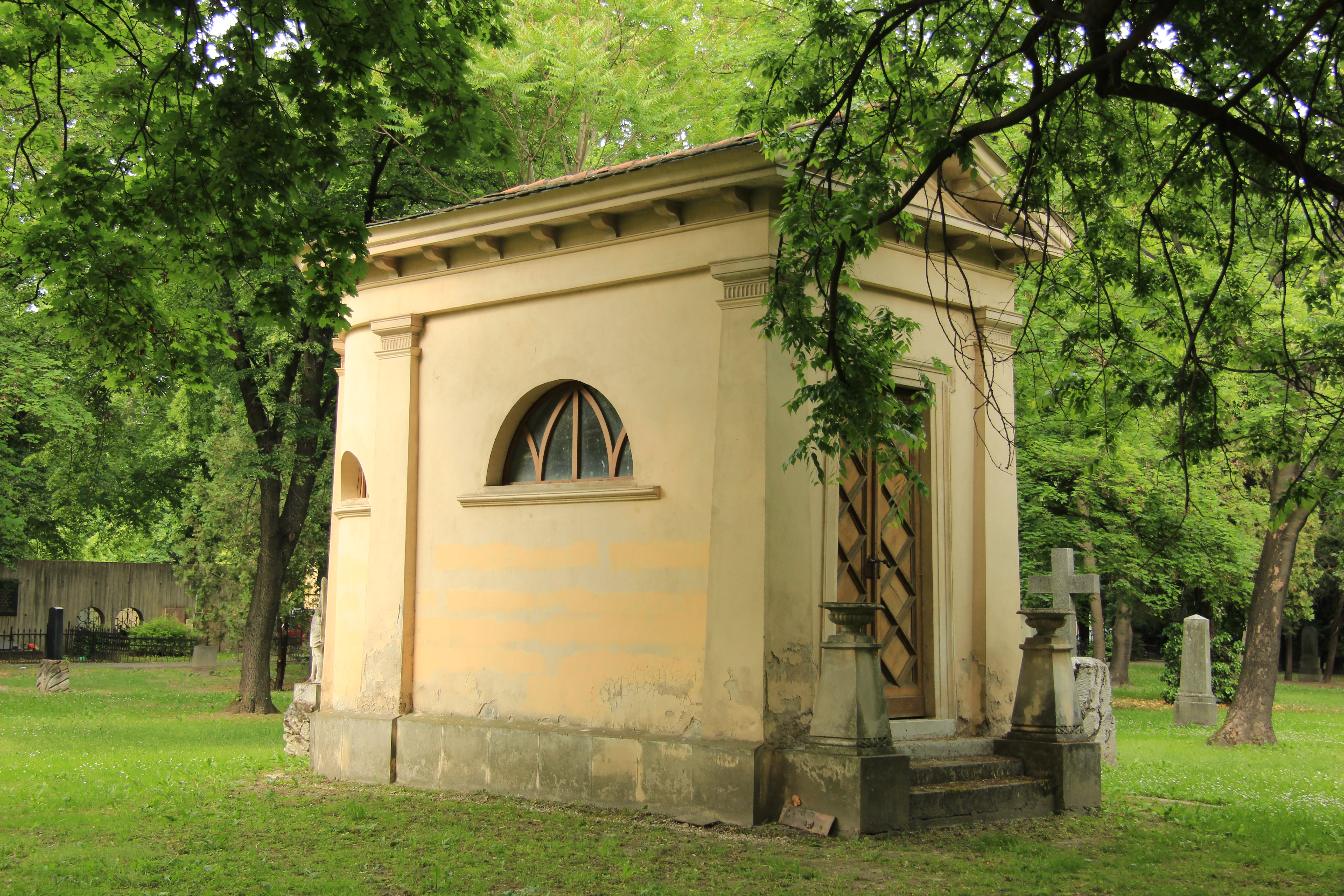 kaplnka pohrebná+rod. Wachtler; kaplnka rod. Wachtler